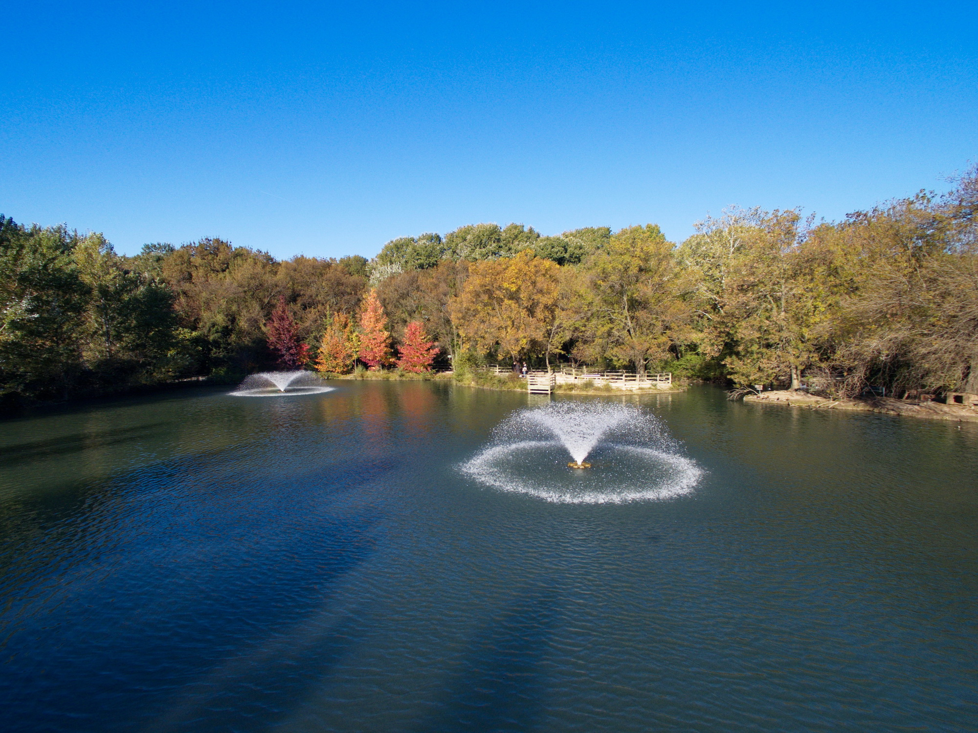 Plan d'eau Arboretum